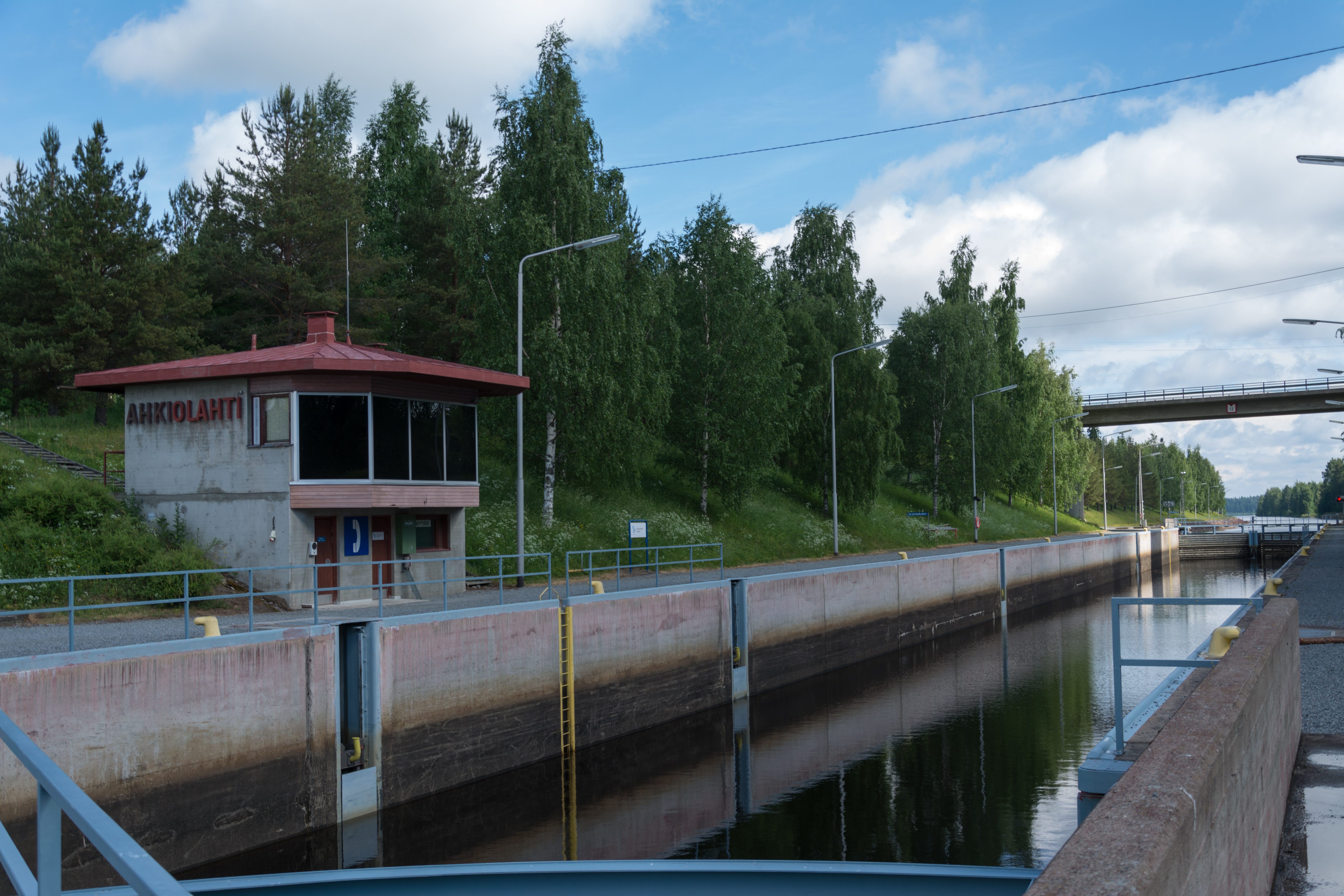 Ahkiolahden kanava Maaningalla. Taustalla kantatien 77 silta.